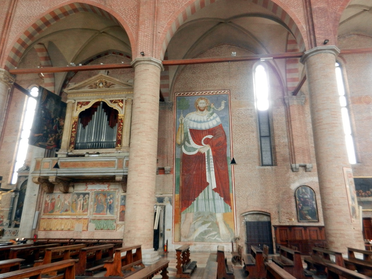 Treviso - Interno della Chiesa di S. Nicolò